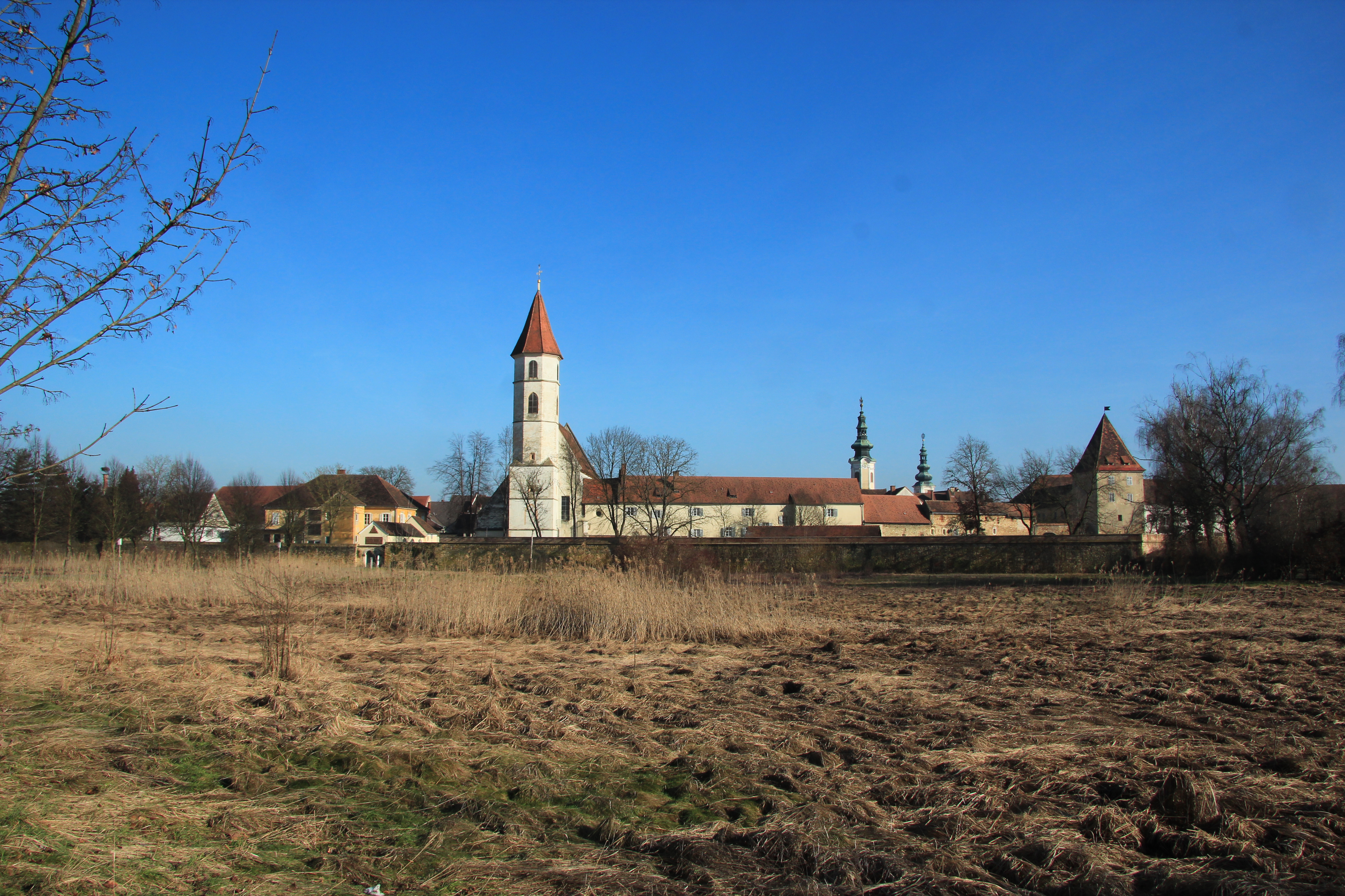 Stadtmauer in Bad Radkersburg vom Kurpark aus